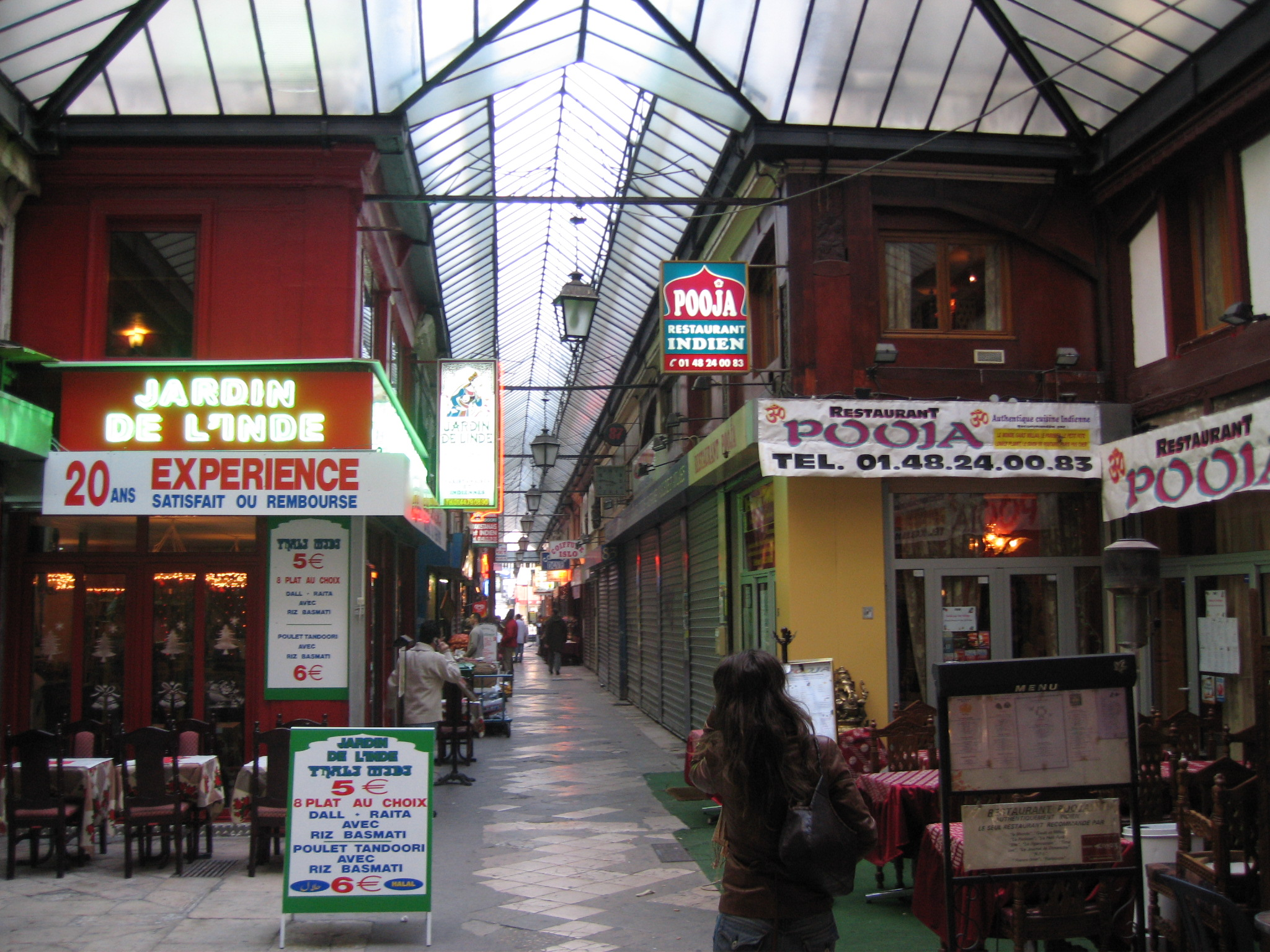 Passage Brady, Paris 10e